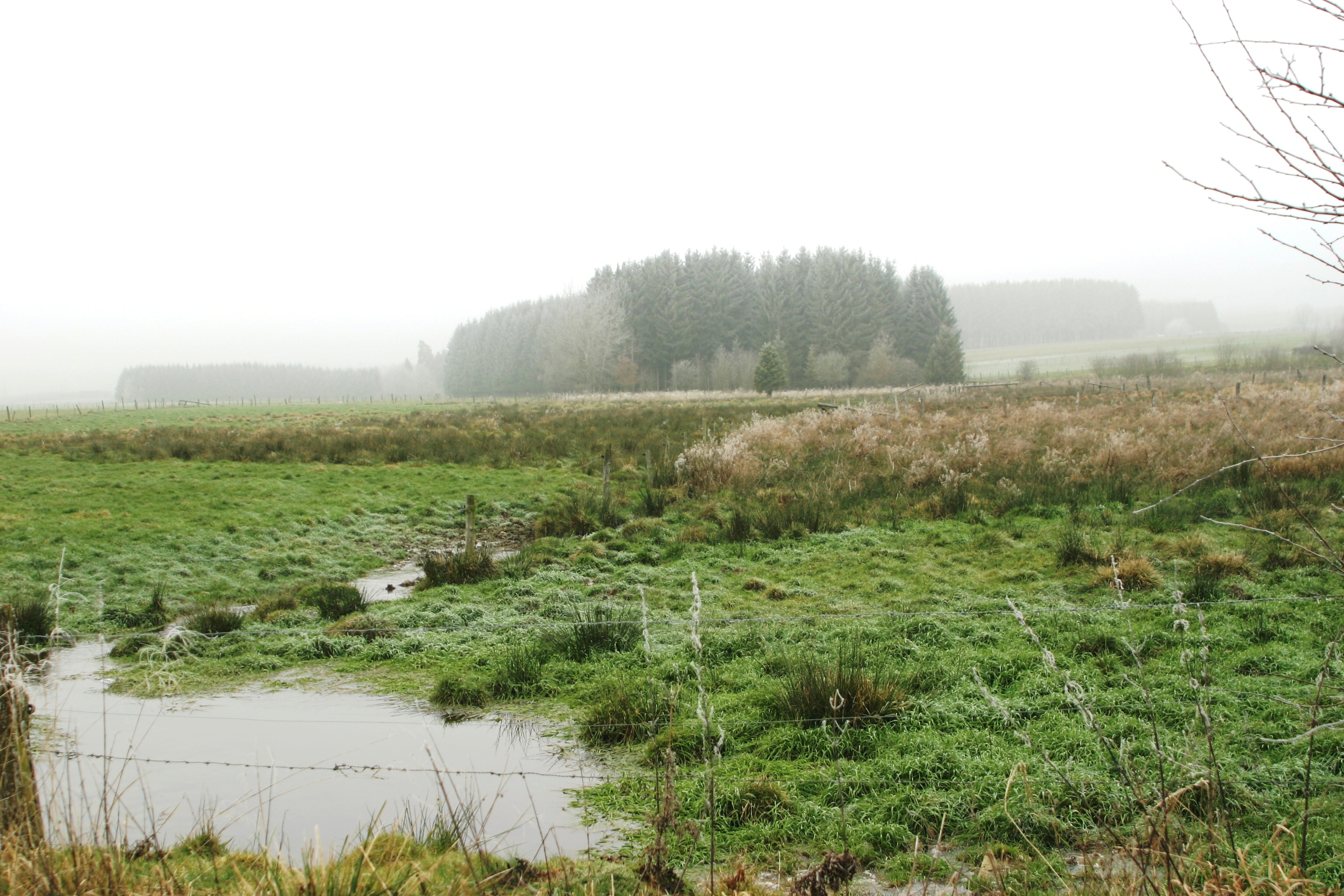 Quellgebidd vun der Braunlauf bei Maldingen. Braunlauf